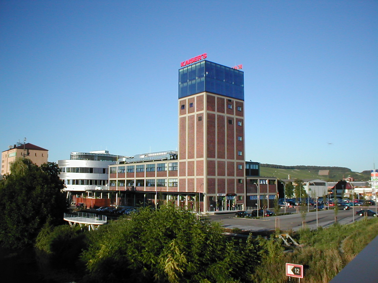 Kaiser‘s-Turm, Heilbronn. Seit dem Bau der neuen Fügerbrücke 2005 (Boll und Partner) steht der zum Event-Zentrum ausgebaute Turm an exponierter Stelle und ist weithin sichtbar.